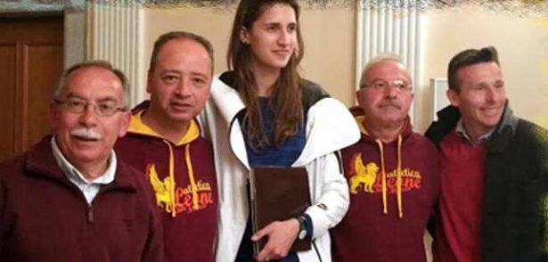 con Gianfranco Chessa, Filippo Glaneo Alessia Trost, Leonardo Pietrafesa e Paolo Camossi